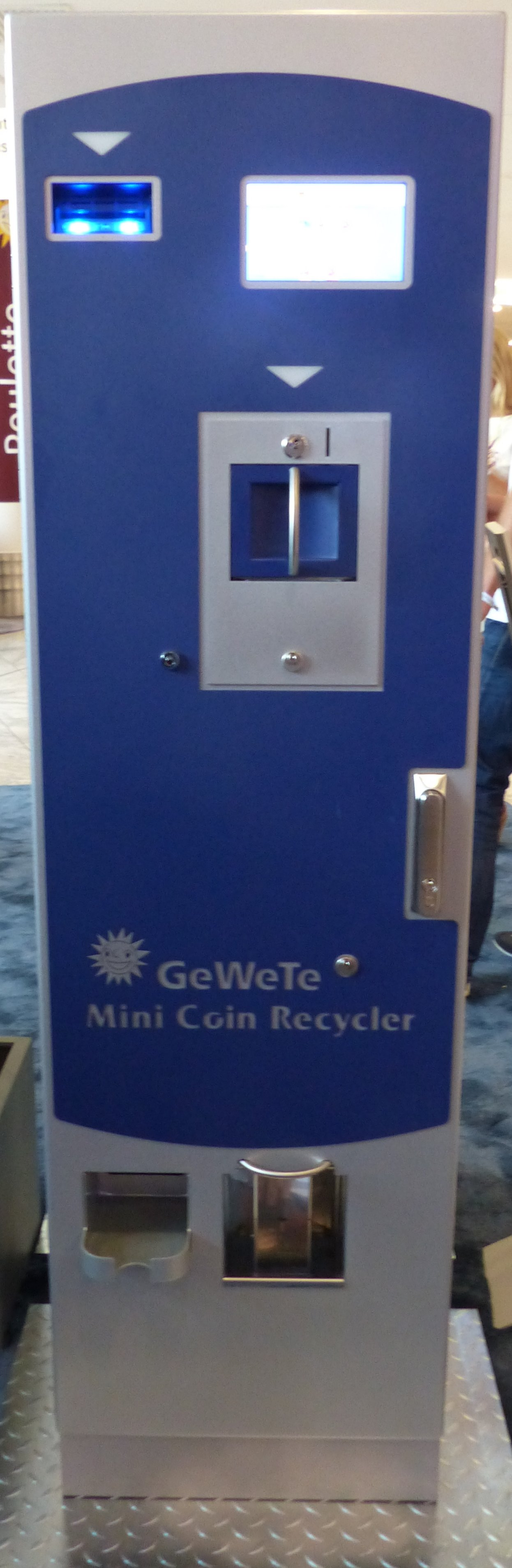 Geldwechselautomat: Banknoten in Münzen und umgekehrt (Banknoteneingabe: oben links, Banknotenausgabe: unten links, Münzeingabe einzeln oder Becher-weiseː oben rechts, Münzausgabeː unten rechts).